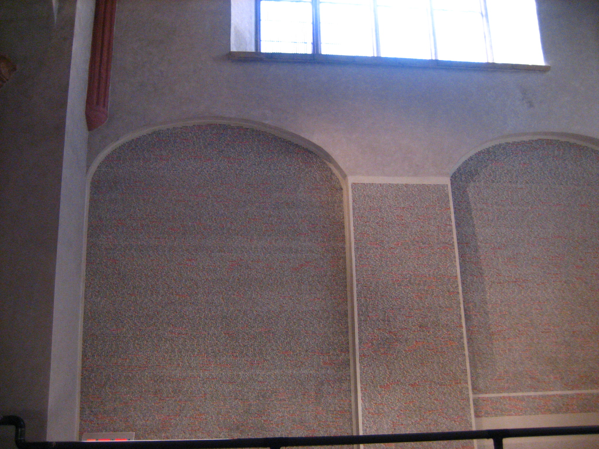 Praha, Pinkasova synagoga, jména českých obětí šo'a